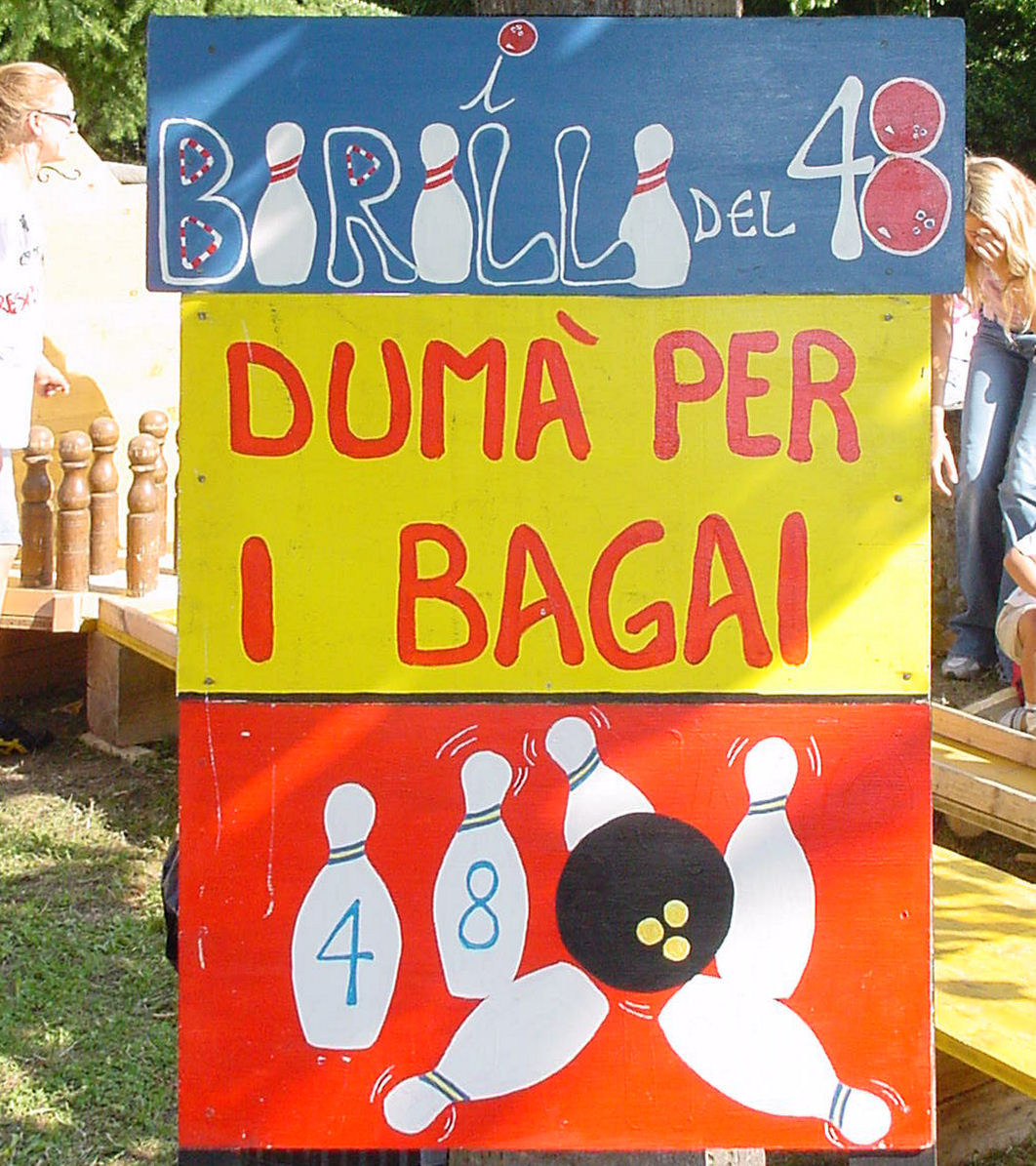 dialet de canz